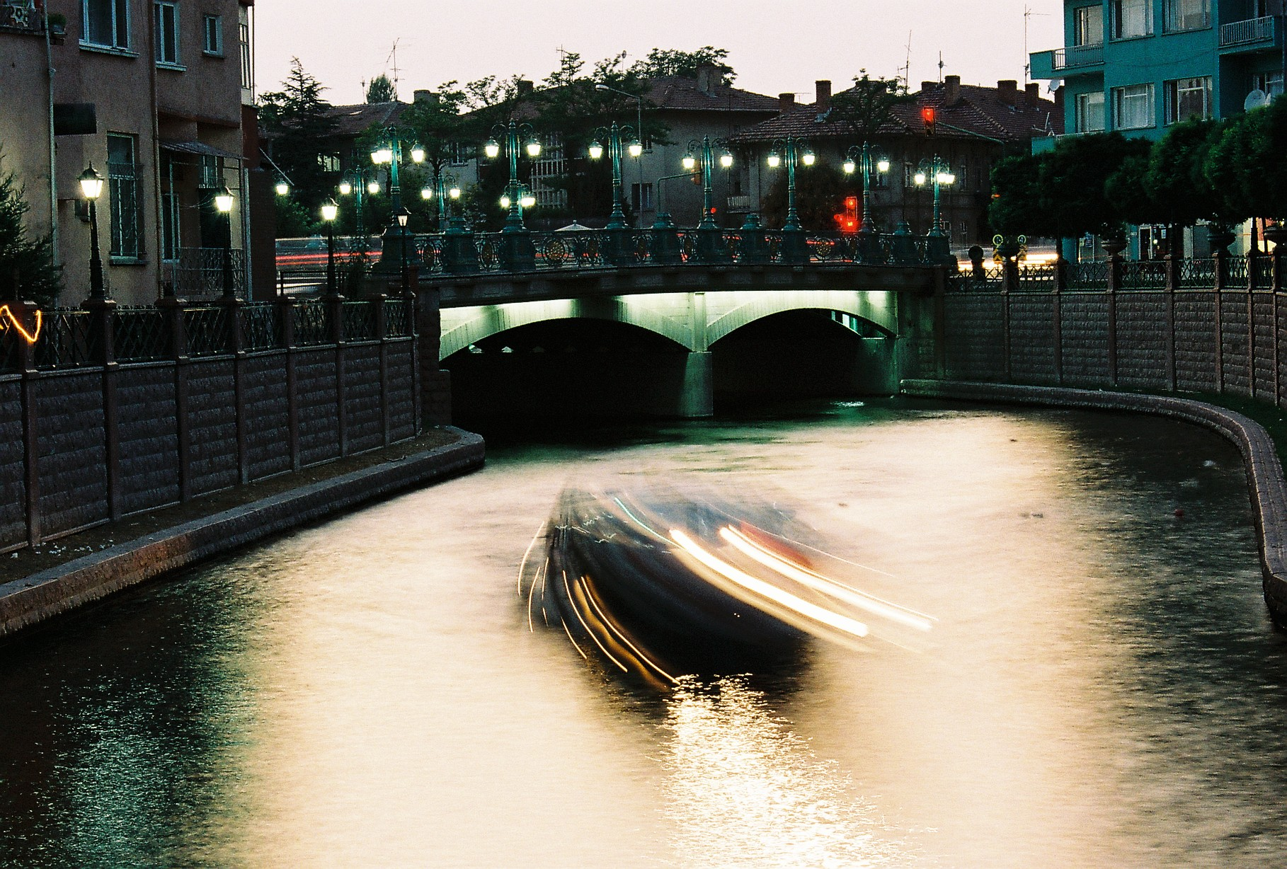 Porsuk nehri üzerinde gezen gezi amaçlı EsBot.